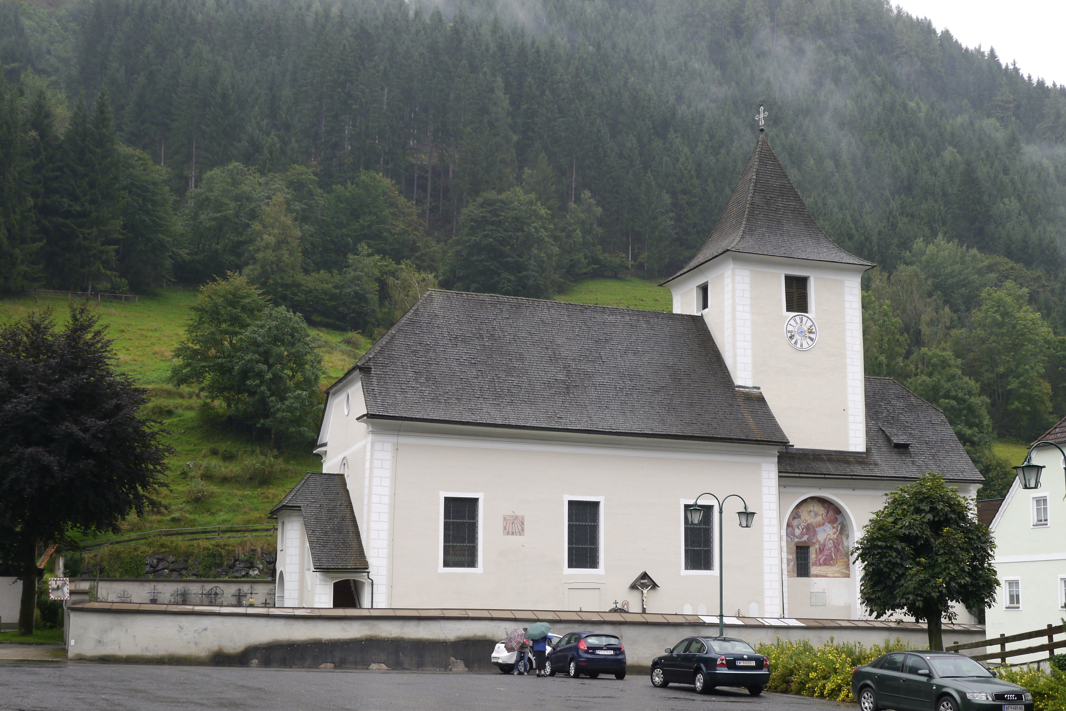 Kath. Pfarrkirche hl. Petrus und Friedhofsmauer